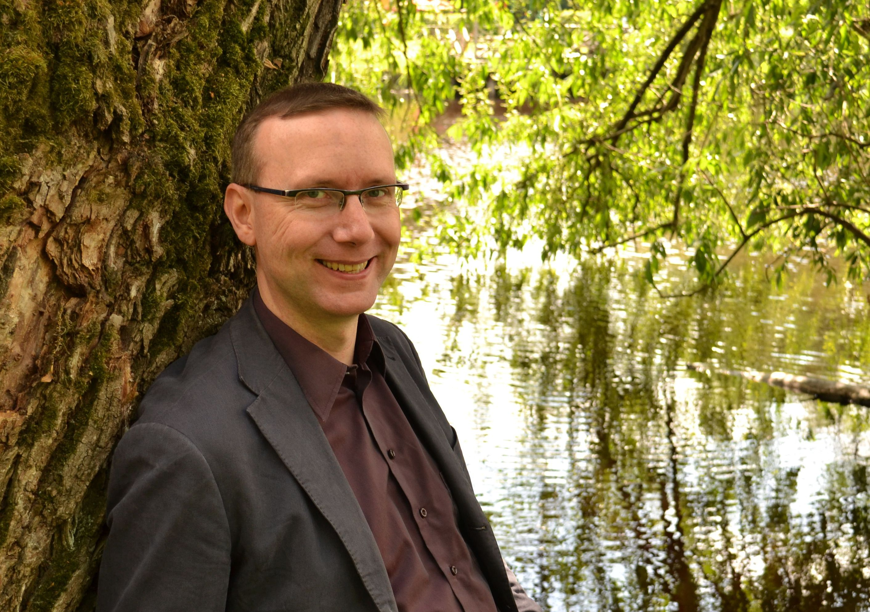 Marcus Willén Ode, 2013. Fotograf: Emma Ode